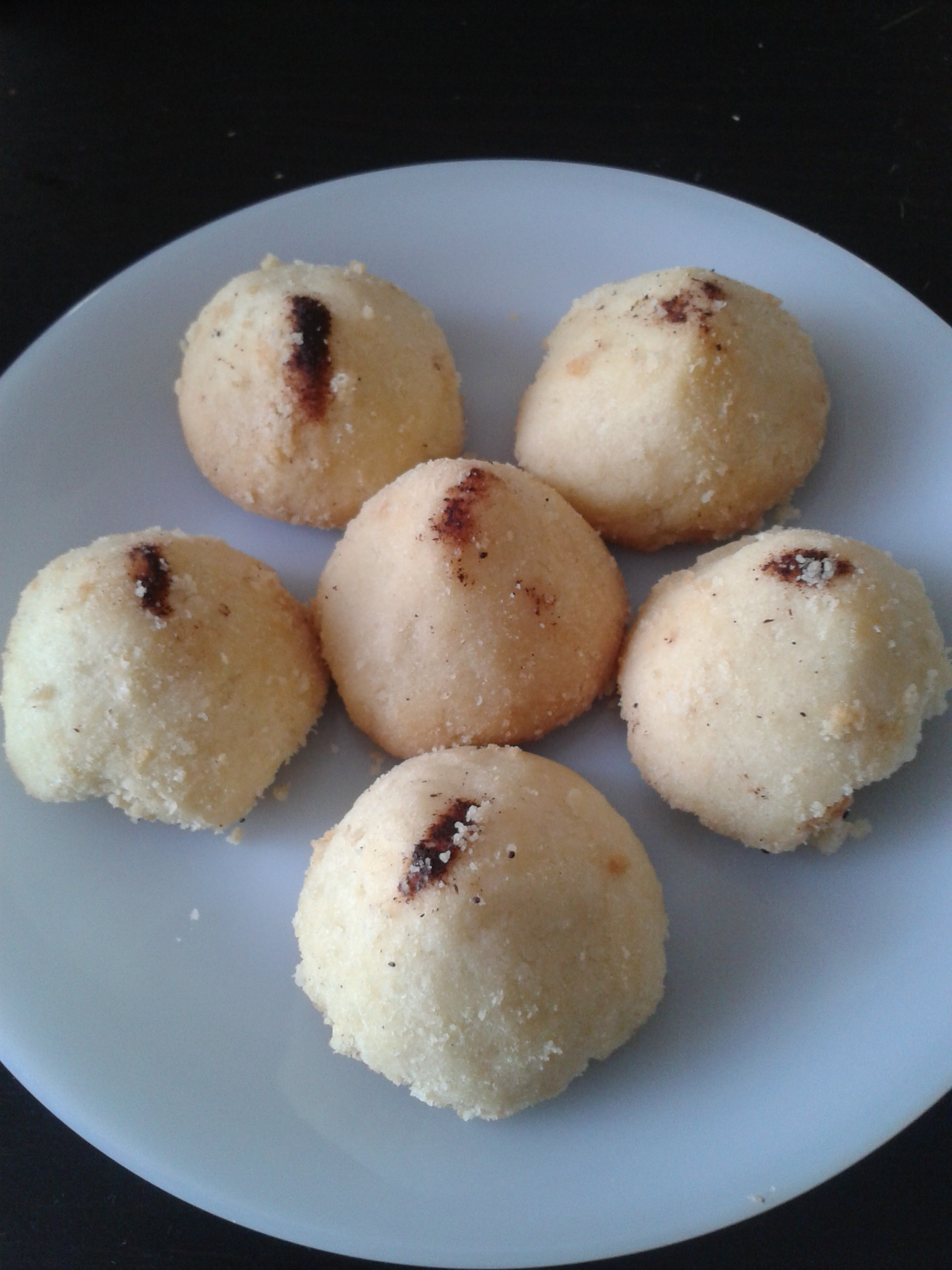 Ghribia, pâtisserie algérienne.